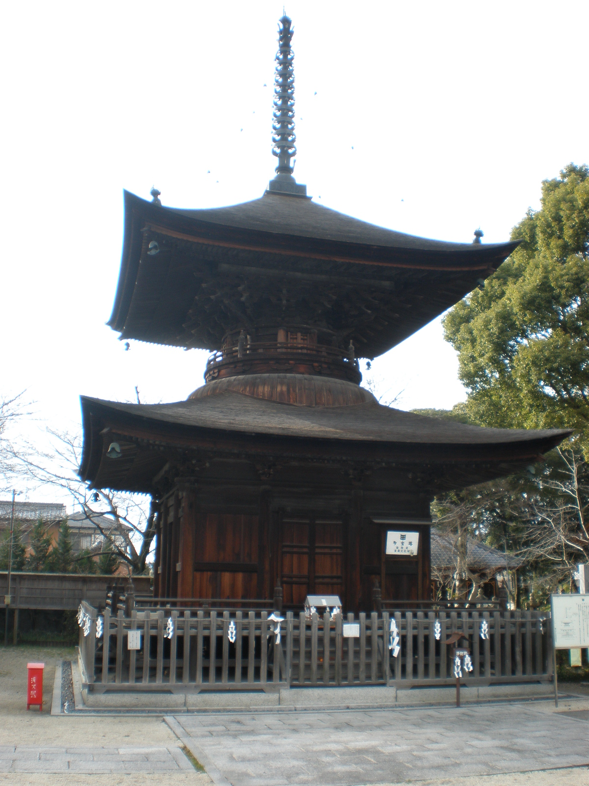 愛知県春日井市の密蔵院にある多宝塔